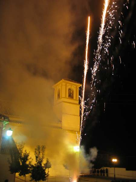 Fuegos artificiales en Villanueva Mesía, Granada (España)